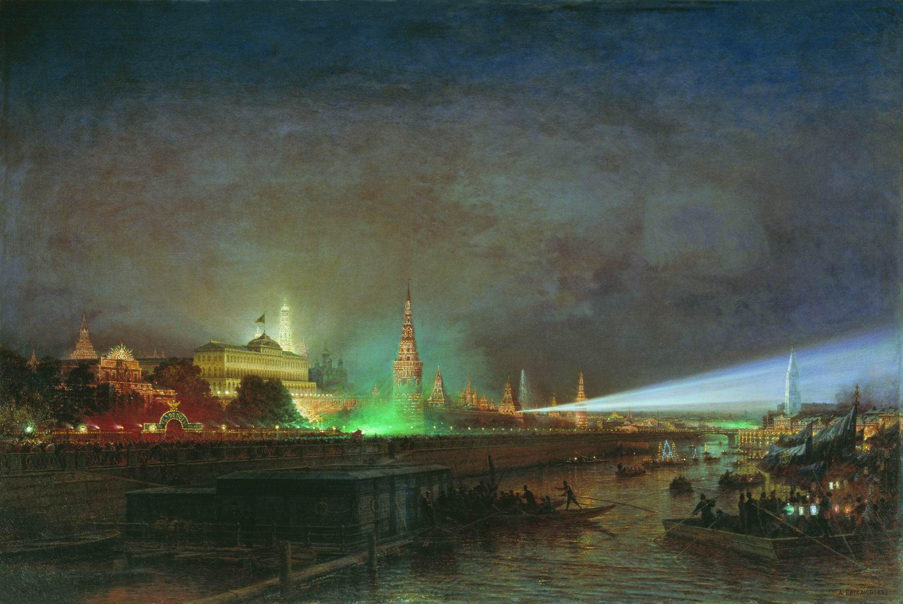 Kremlin illumination in 1883